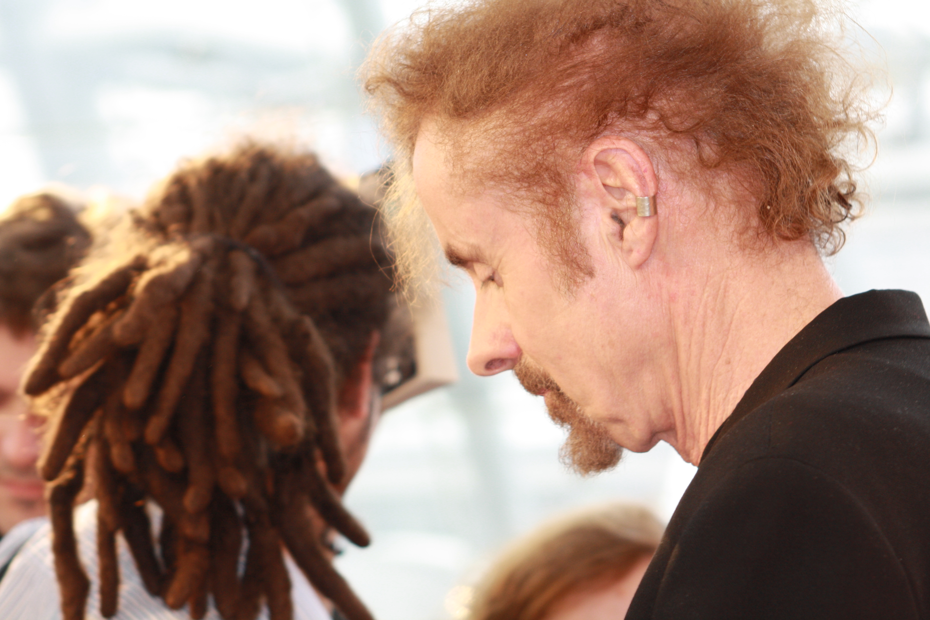 T.C. Boyle beim Signieren auf der Leipziger Buchmesse 2009